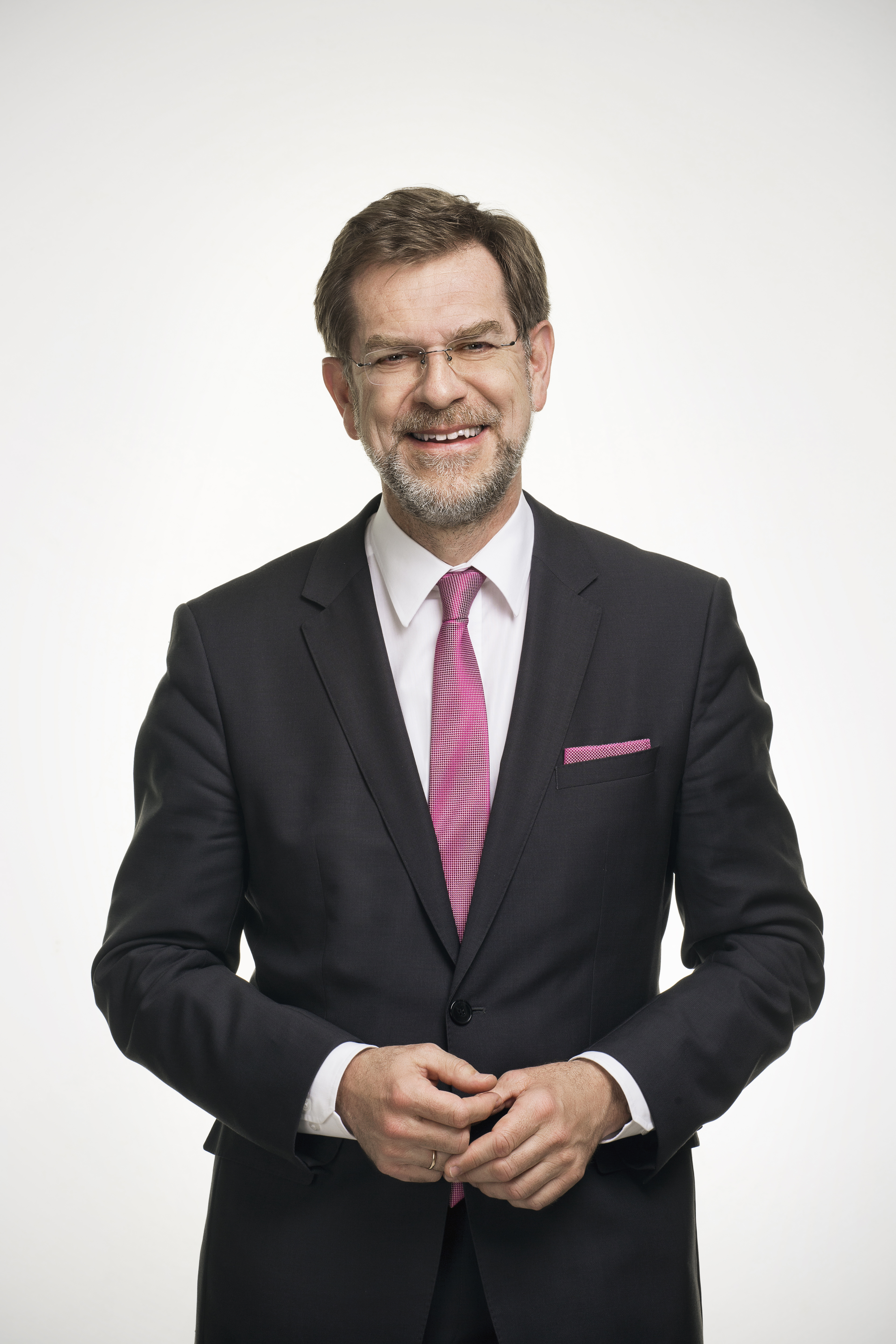 Fotocredit: VBV